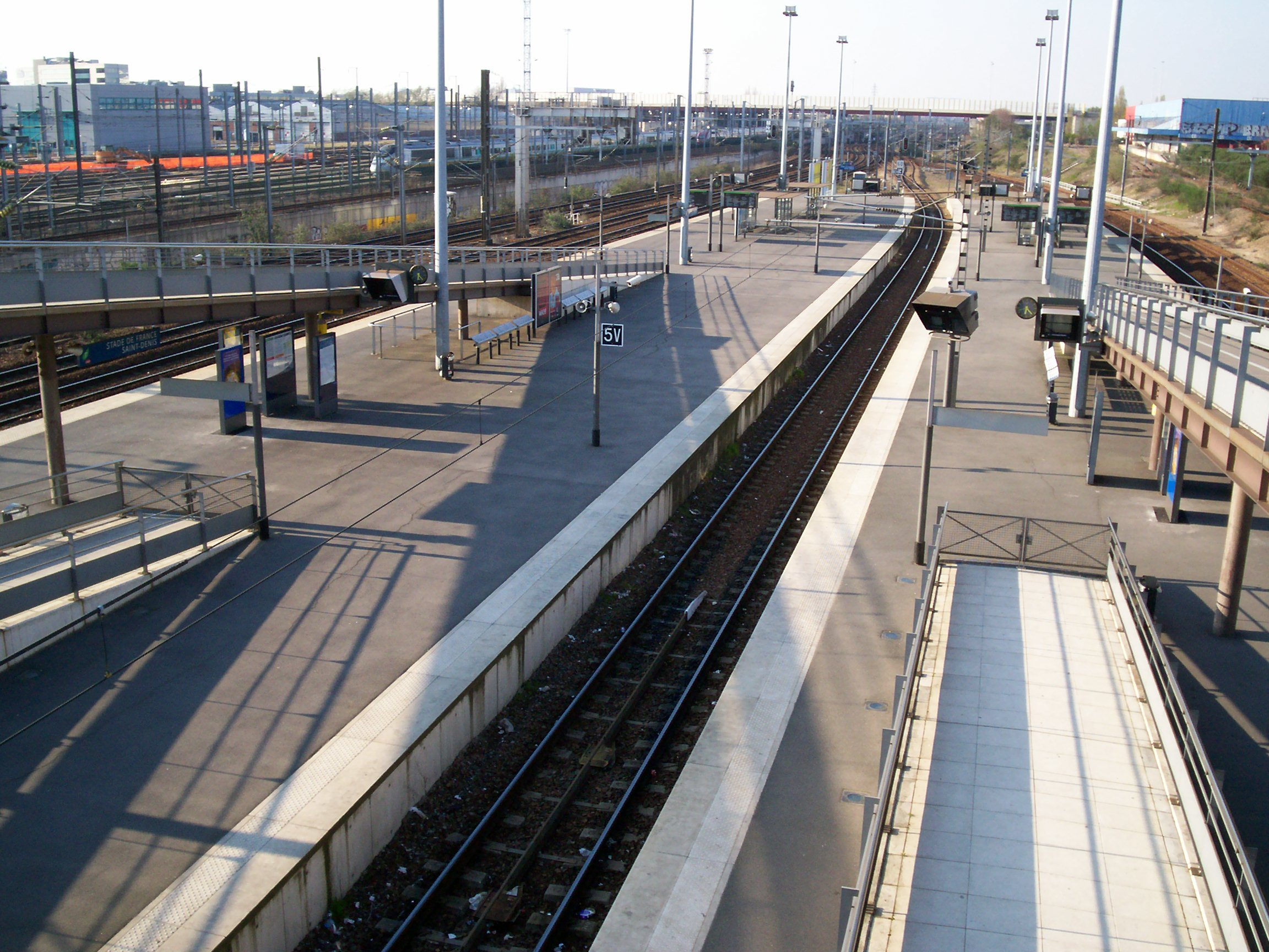 Gare du Stade de France - Saint-Denis